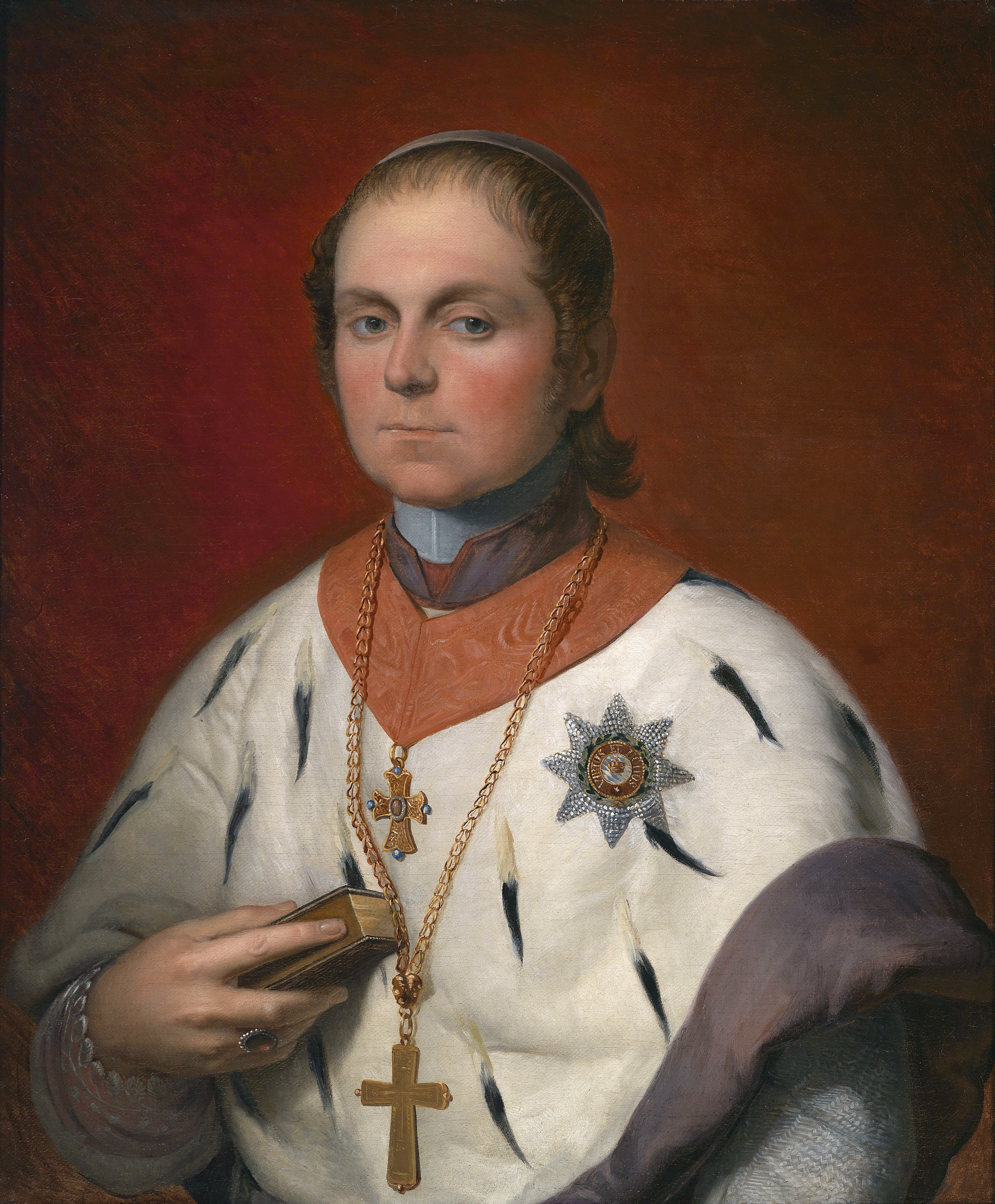 Eichstätter Bischofs Georg von Oettl (1794-1866)